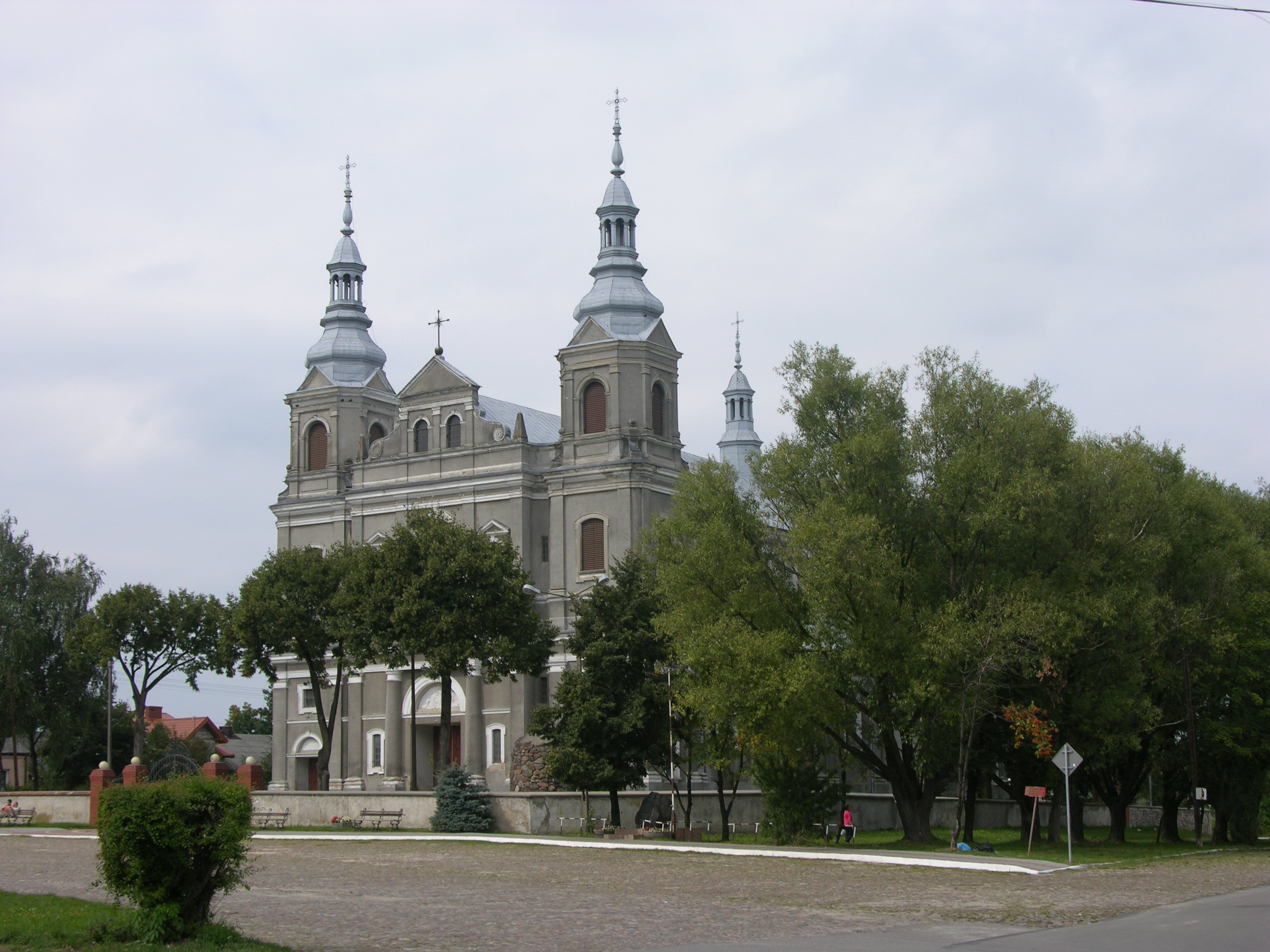 Parysów - kościół parafialny pw. Wniebowzięcia NMP (zabytek